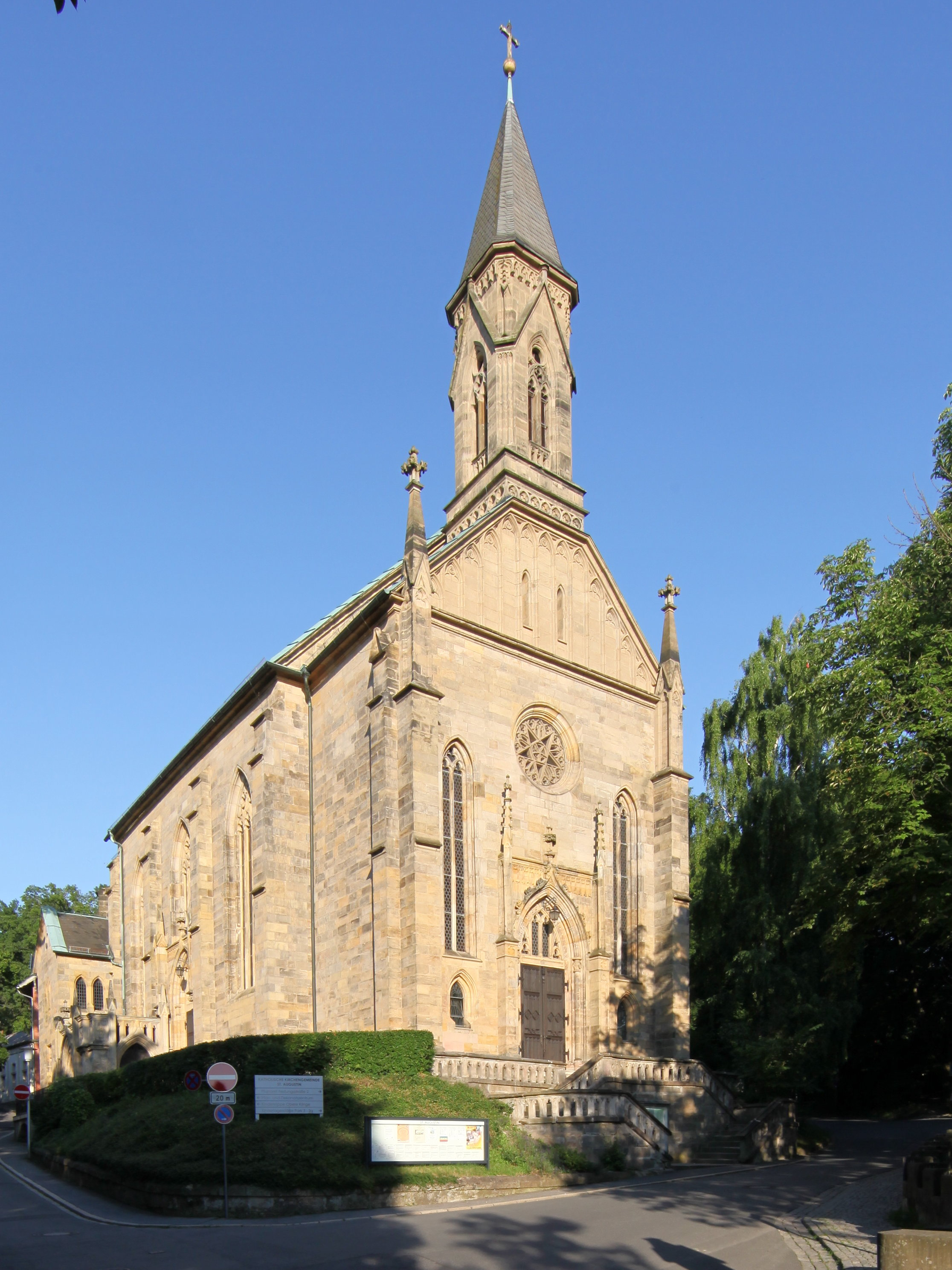 St. Augustin, Coburg